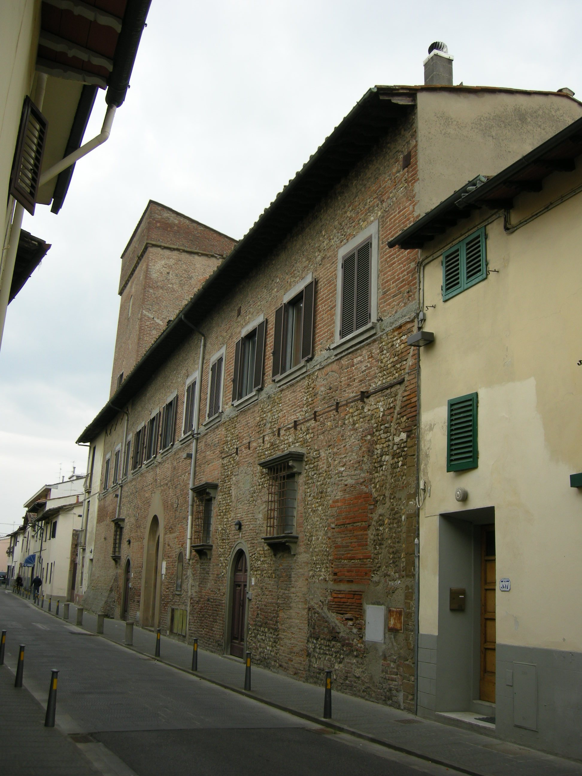 Torrione di brozzi